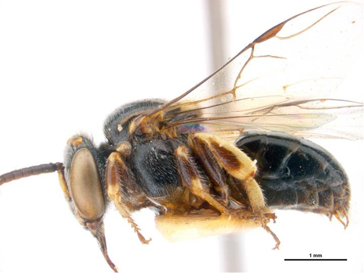 Austroplebeia symei male